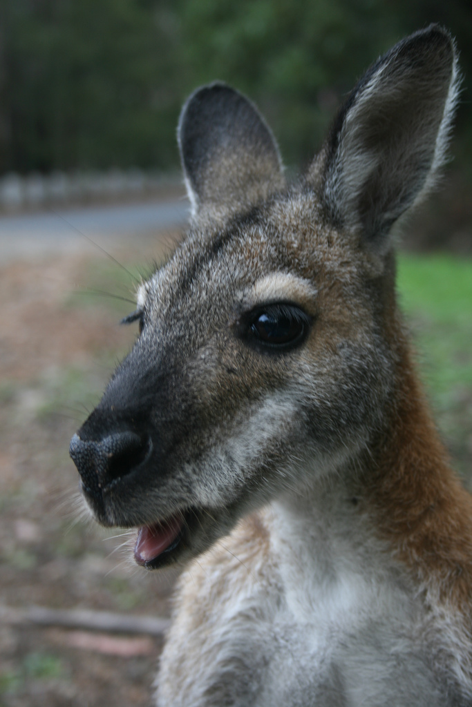 A wild kangaroo.